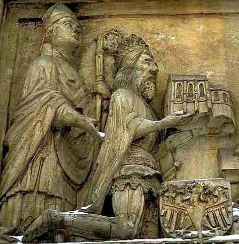 Biskup krakowski Bodzanta i Kazimierz III Wielki na płaskorzeźbie nad wejściem do kolegiaty w Wiślicy. autor: mzopw